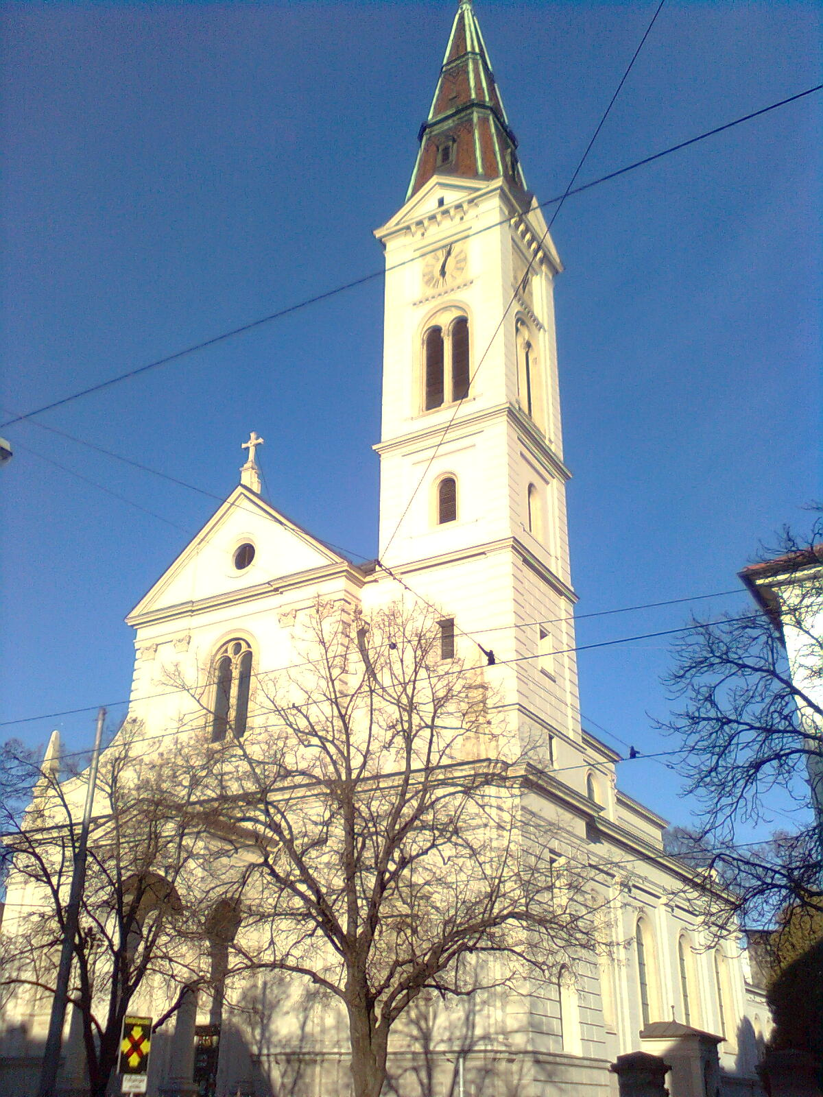 Grazer Josefskirche